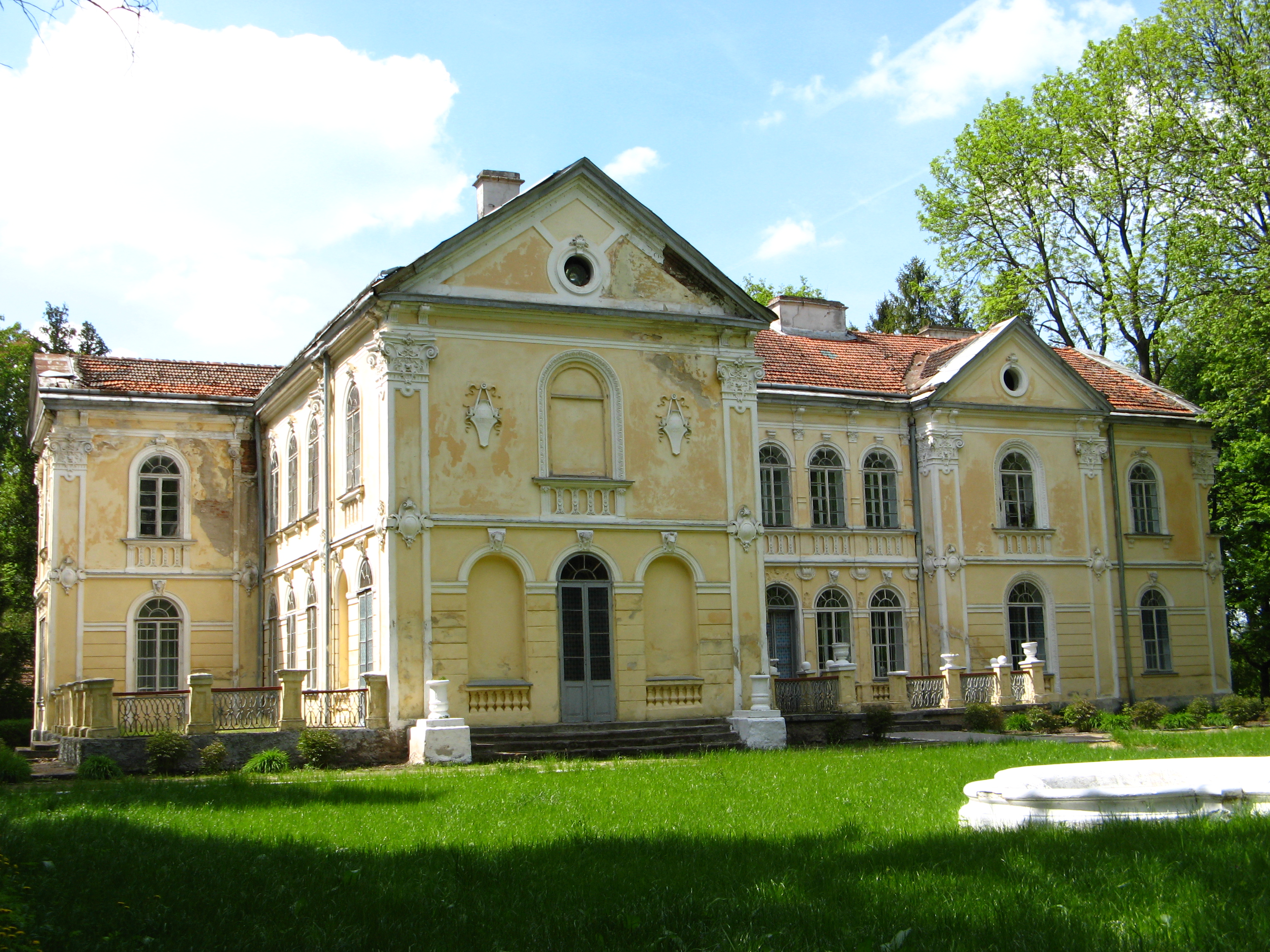 Палац Фредрів-Шептицьких (с. Вишня, Львівська обл.)